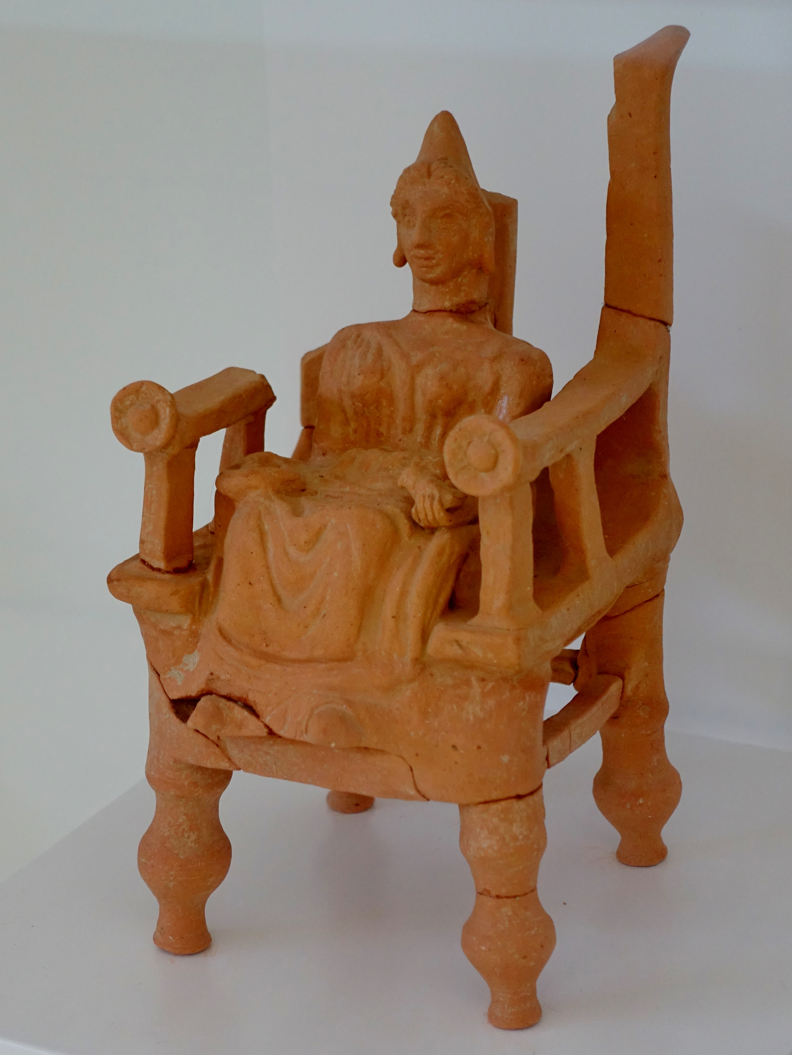 Kybele-Figurine mit phrygischer Mütze aus Praisos (Anfang 5. Jahrhundert v. Chr.), Archäologisches Museum von Sitia, Kreta, Griechenland